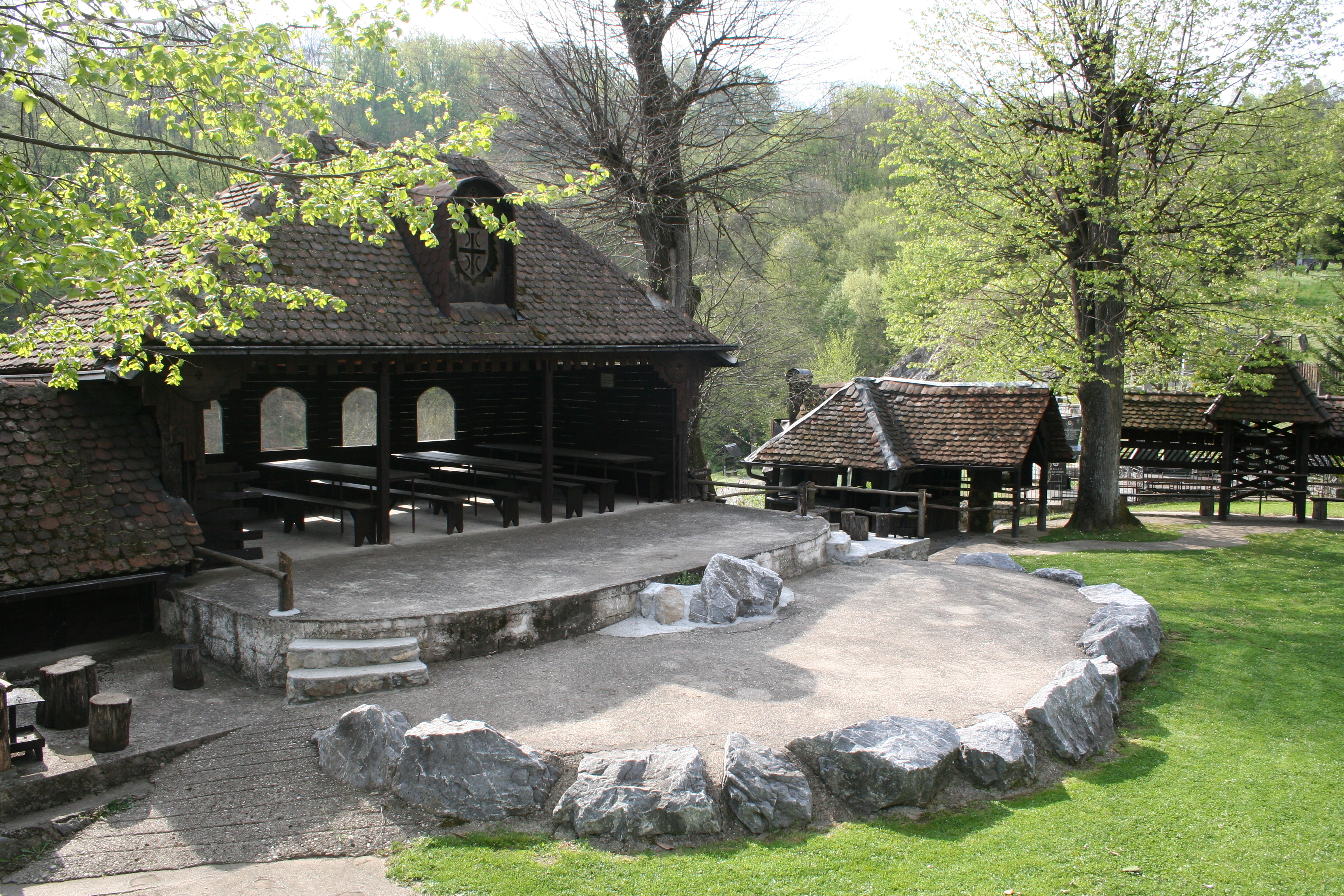 Crkva Uspenja Presvete Bogorodice, Dobri potok Krupanj